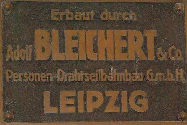 Firmenschild Bleichert Personen-Drahtseilbahn GmbH Leipzig